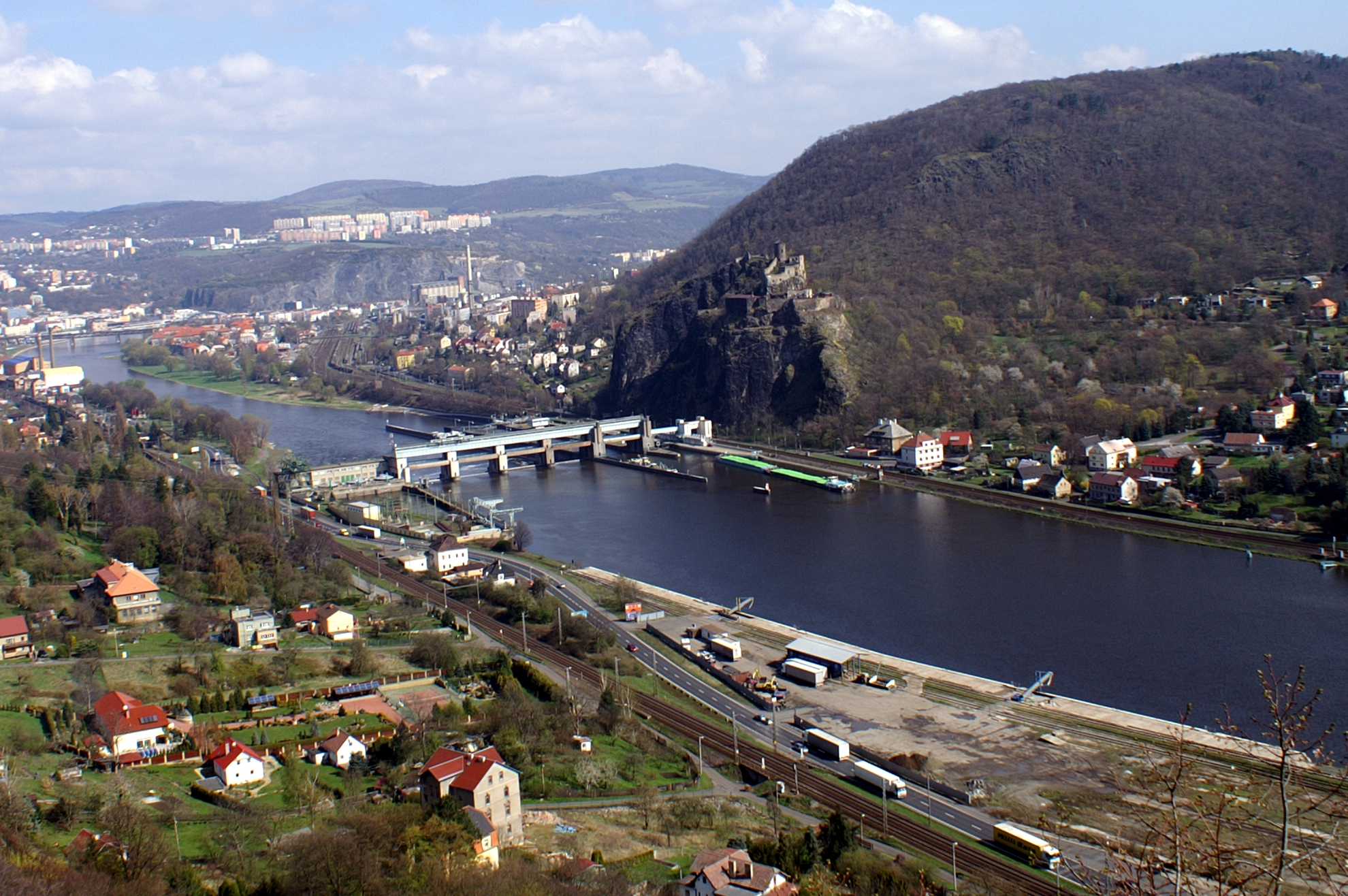 Pohled z Humboldtovy vyhlídky na Vaňovské přístaviště, Masarykova zdymadla (též zdymadlo Střekov) na řece Labe, hrad Střekov a město Ústí nad Labem.